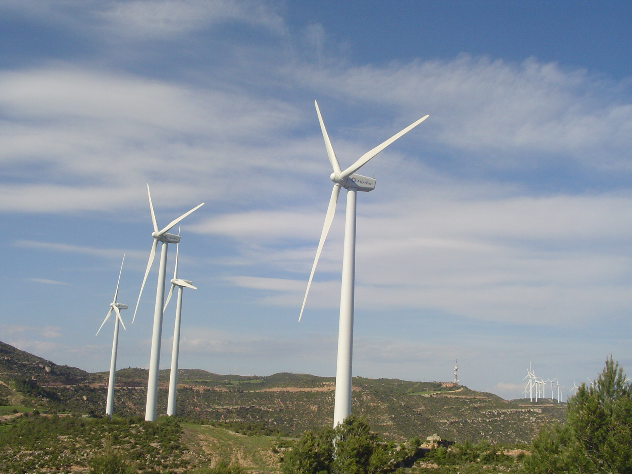 Parc Eòlic de la Serra de Rubió (maig 2007)